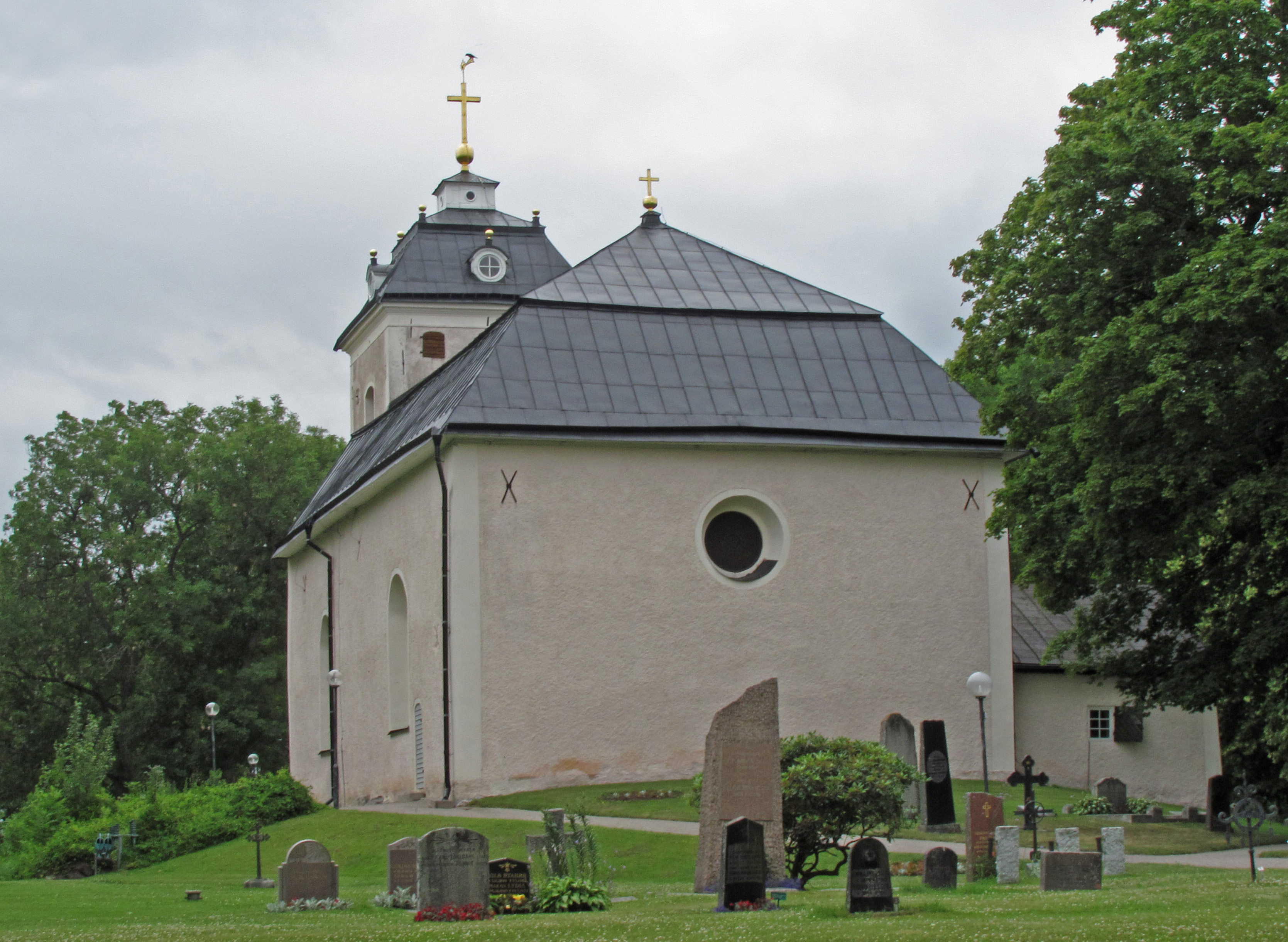 Kungsåra kyrka